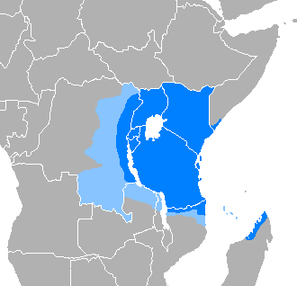 idioma suajili